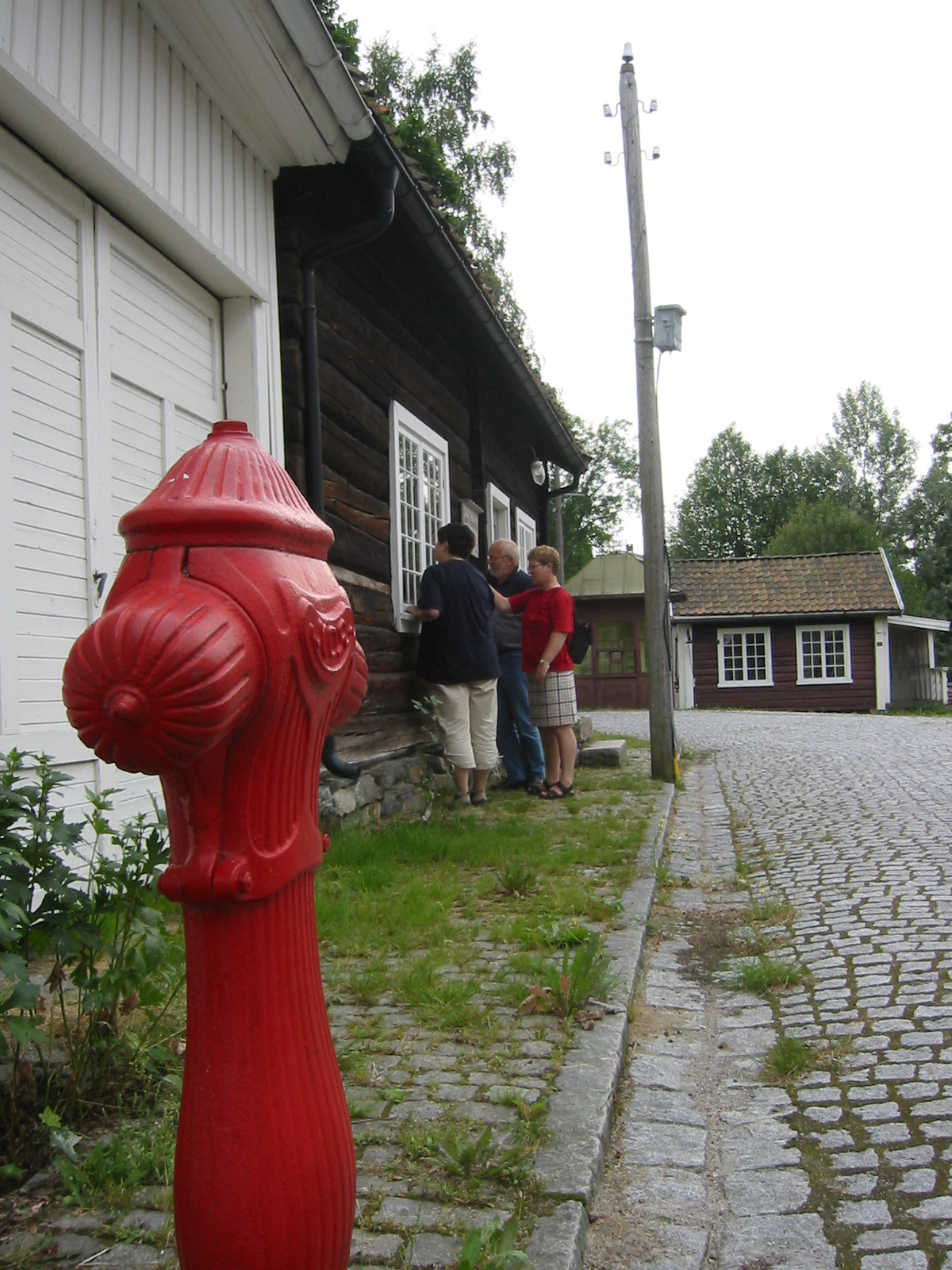 Lågdalsmuseet, Kongsberg, august 2003.